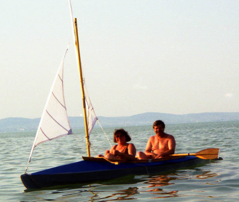 Pouch-Faltboot mit Segel auf dem Balaton/Ungarn 1989